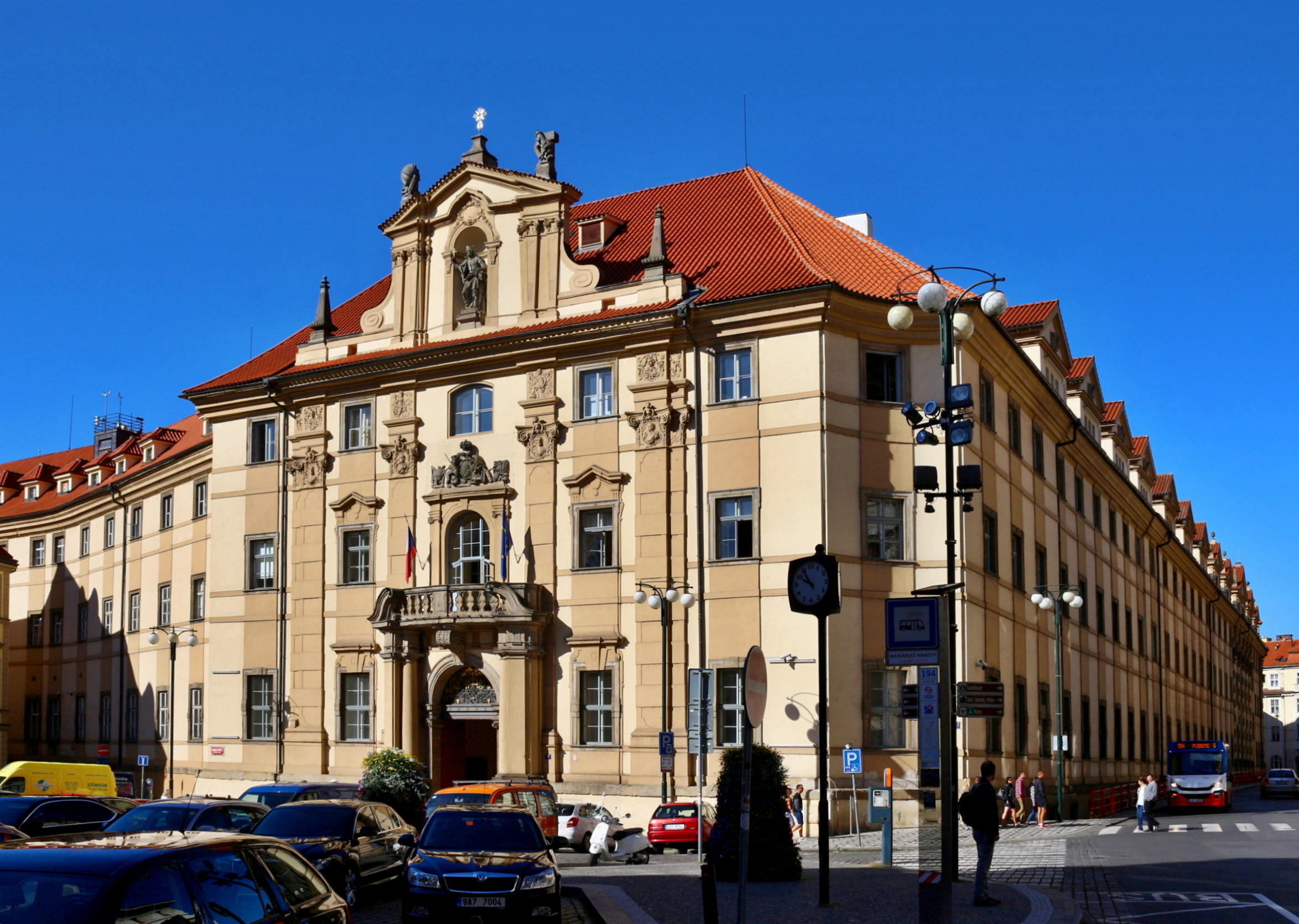 Klementinum